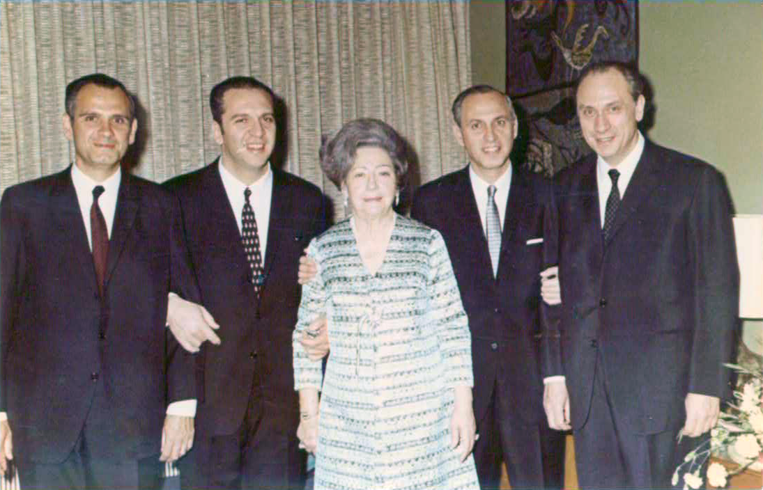 ארבעת האחים (בניו של ליאון רקנאטי) עם האמא מתילדה רקנאטי. מימין לשמאל: זכריה (הארי), דניאל, האמא מתילדה, רפאל ויעקב (ז'ק) רקנאטי.